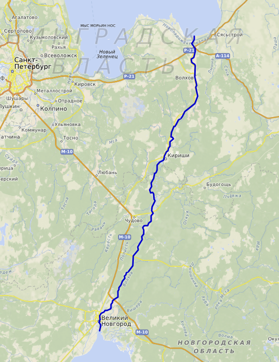 carte réalisée sur umap This map may be incomplete, and may contain errors. Don't rely solely on it for navigation.